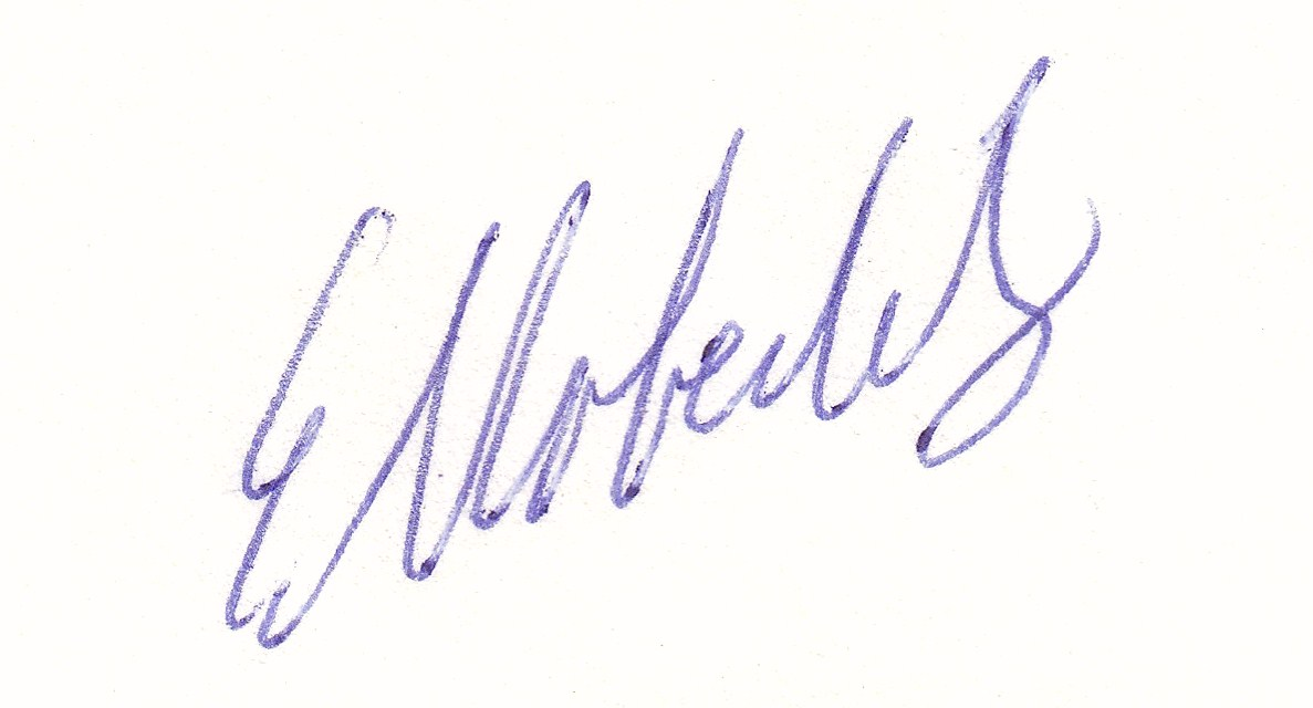 Autogramm des ehemaligen Bundesliga-Spielers